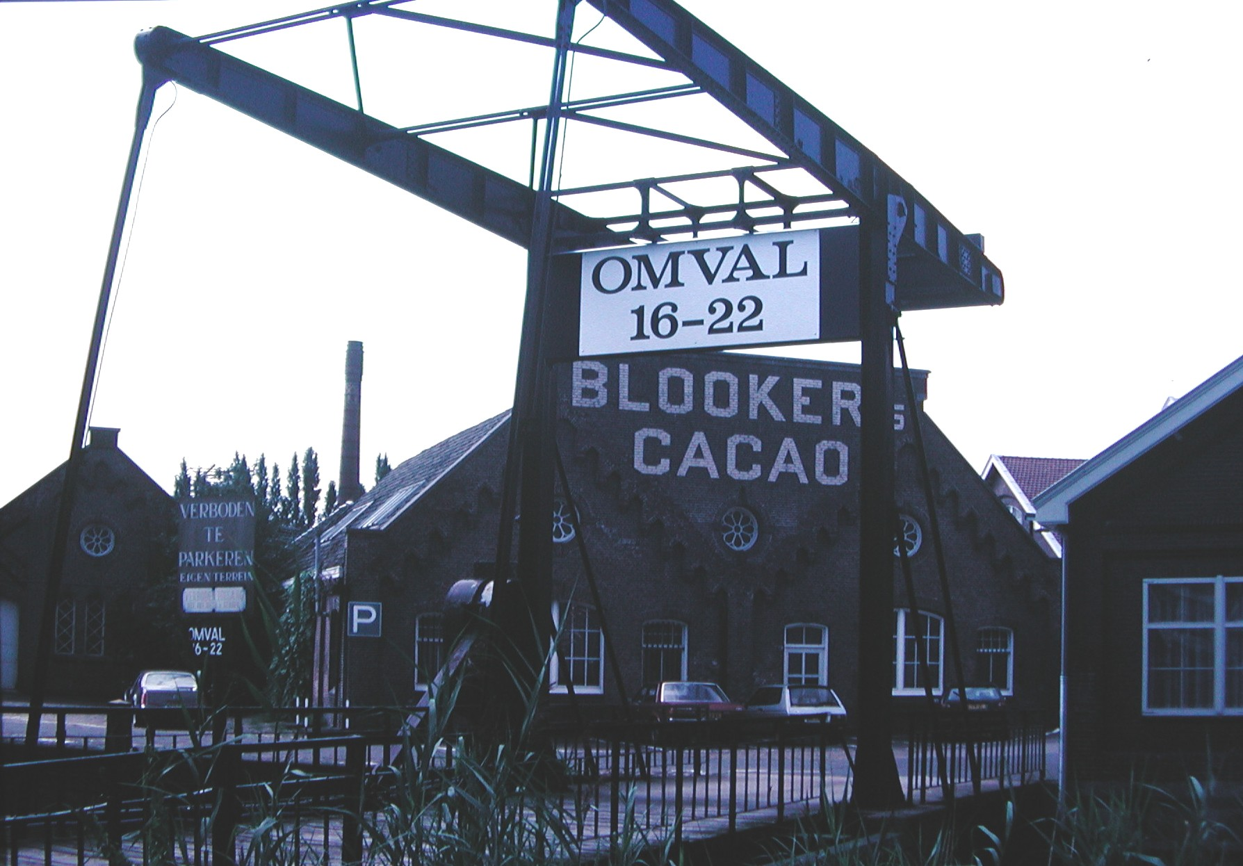 Ophaalbrug Blooker (Amsterdam), auteur P.H.Louw, eigen werk, vrij voor gebruik op wikipedia. Foto omstreeks 1974 Categorie:Afbeelding Amsterdam